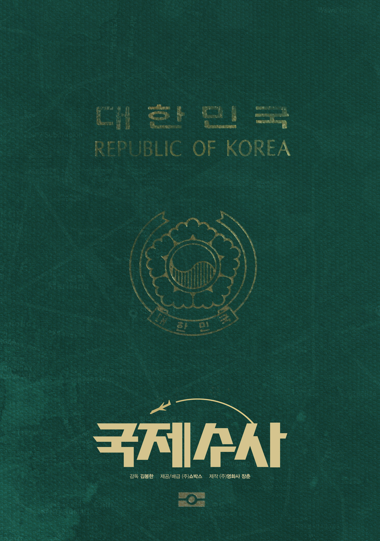 국제수사 시나리오 표지